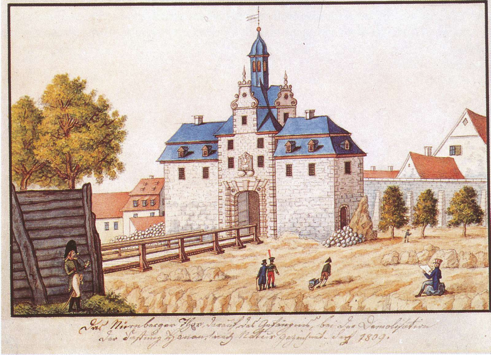 Ansicht des Nürnberger Tors